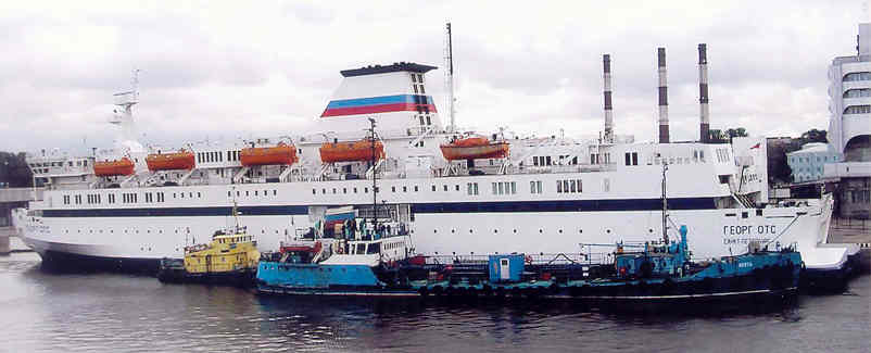 Parvlaev Georg Ots Peterburis